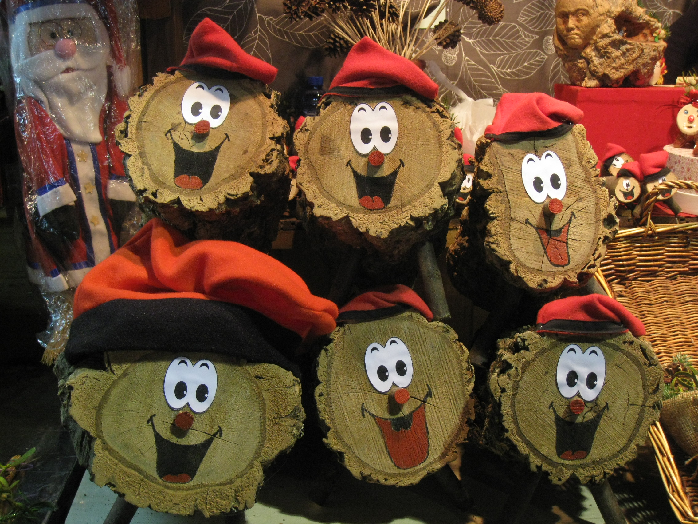 Tions de Nadal a la Fira de Santa Llúcia (Barcelona)